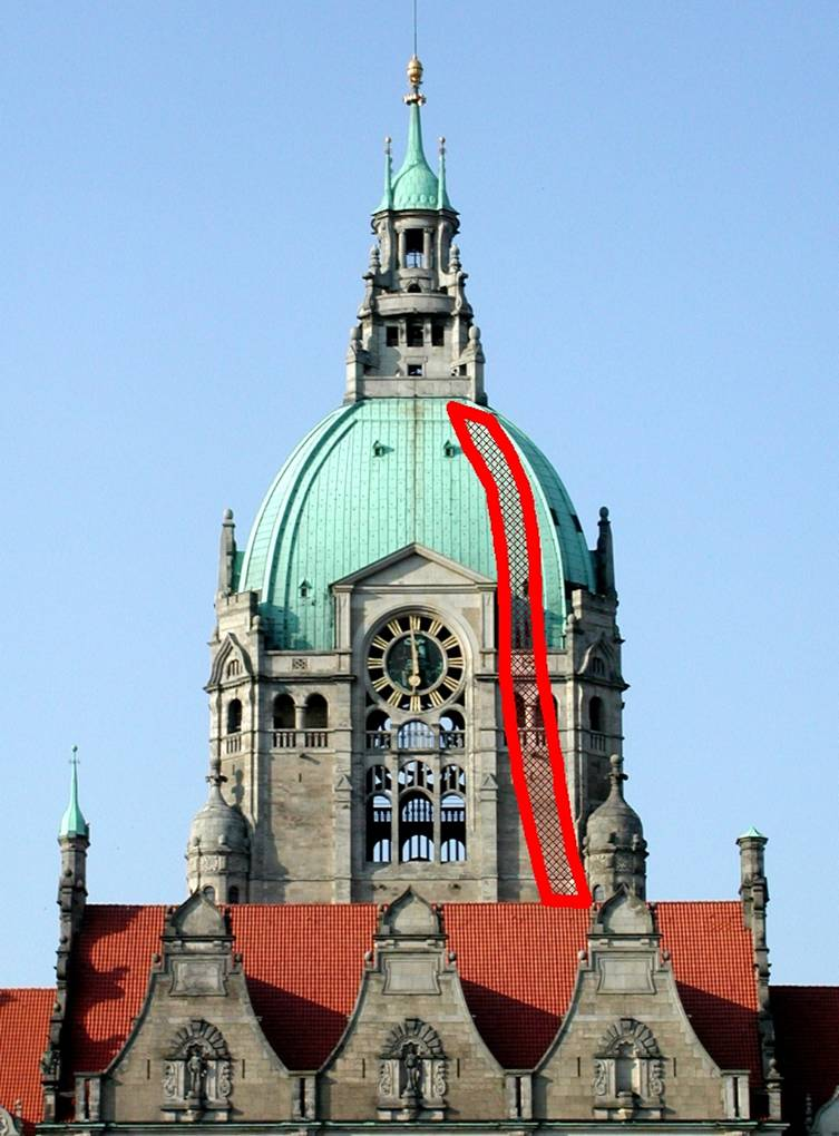 Neues Rathaus Hannover, Kuppelaufzug, aufgenommen und bearbeitet von Hartmut Mackensen, aufgenommen im September 2004